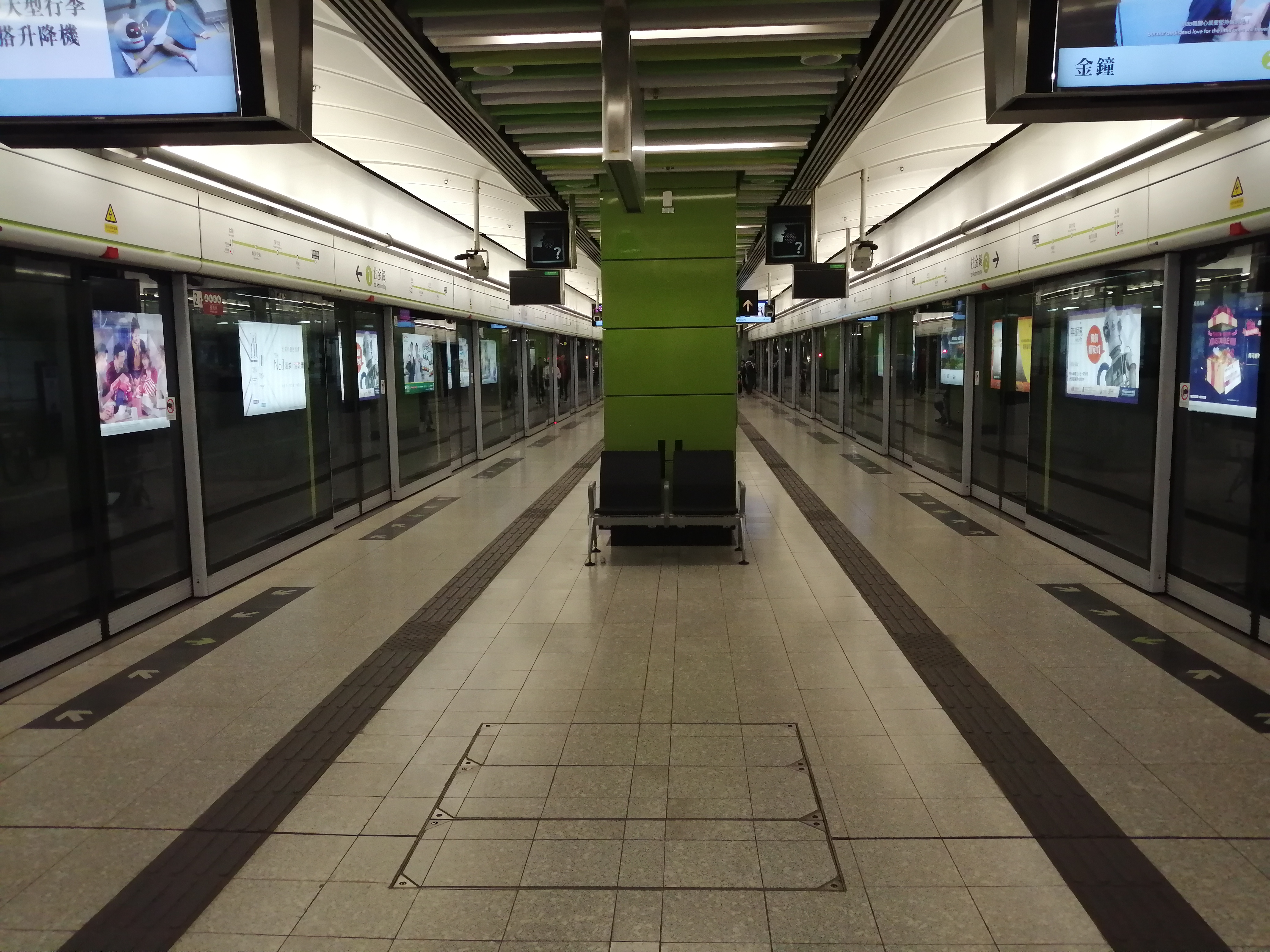 中文（香港）: 海怡半島站狹窄的月台